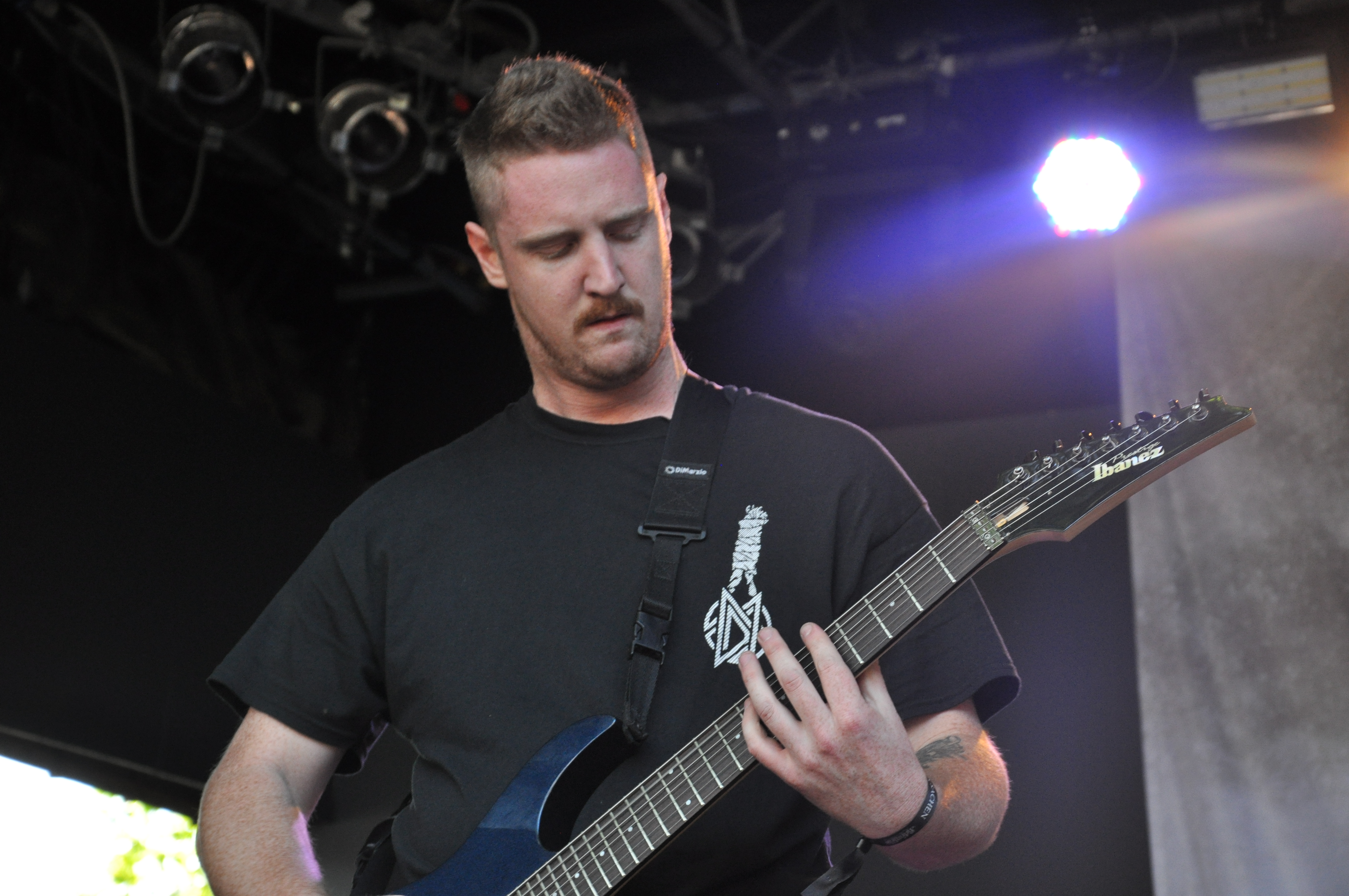 Thy Art Is Murder auf dem Summerblast Festival 2014